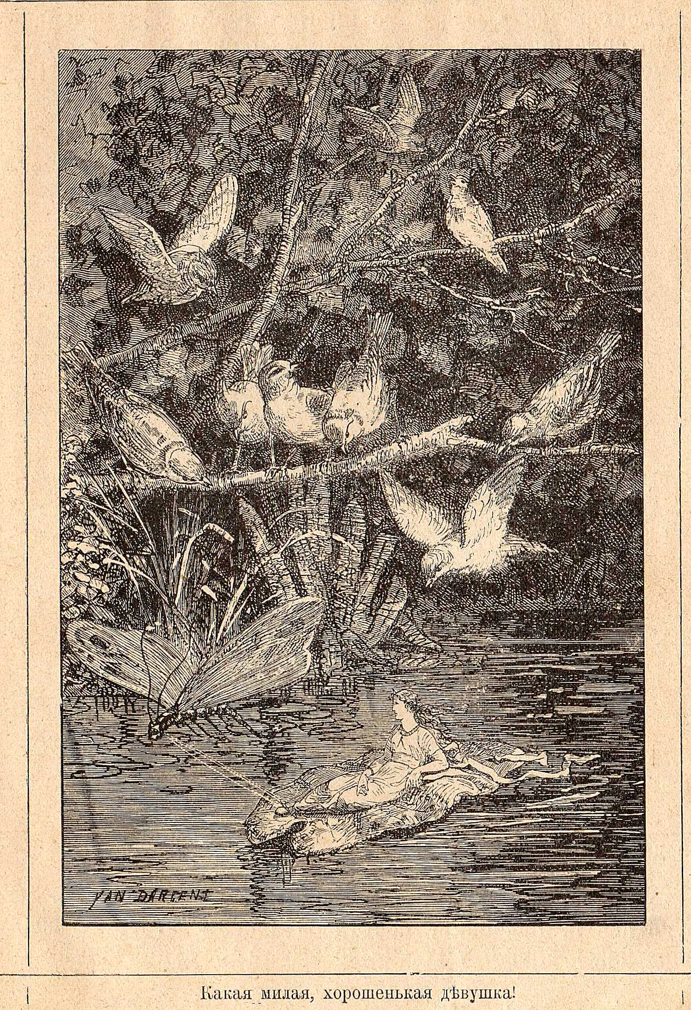 Illustration de Yan Dargent (1824-1899) pour le conte d'Andersen "La petite Poucette" (Tommelise), reprise dans une édition russe de 1914 (Skazki Andersena, livret II, 5e édition, Biblioteka Skazok, Izdanie T-va I.D.Sytina, Moscou)